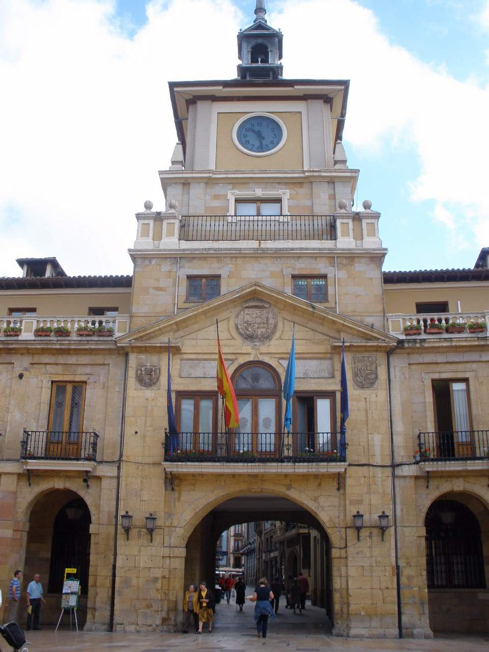 Oviedo - Ayuntamiento